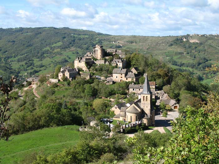 Village de Panat (Commune de Clairvaux-d'Aveyron)